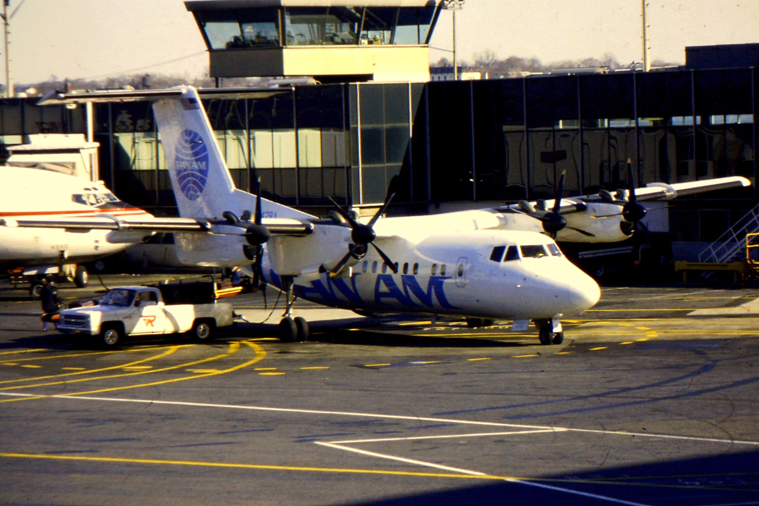 Taken in January 1987.